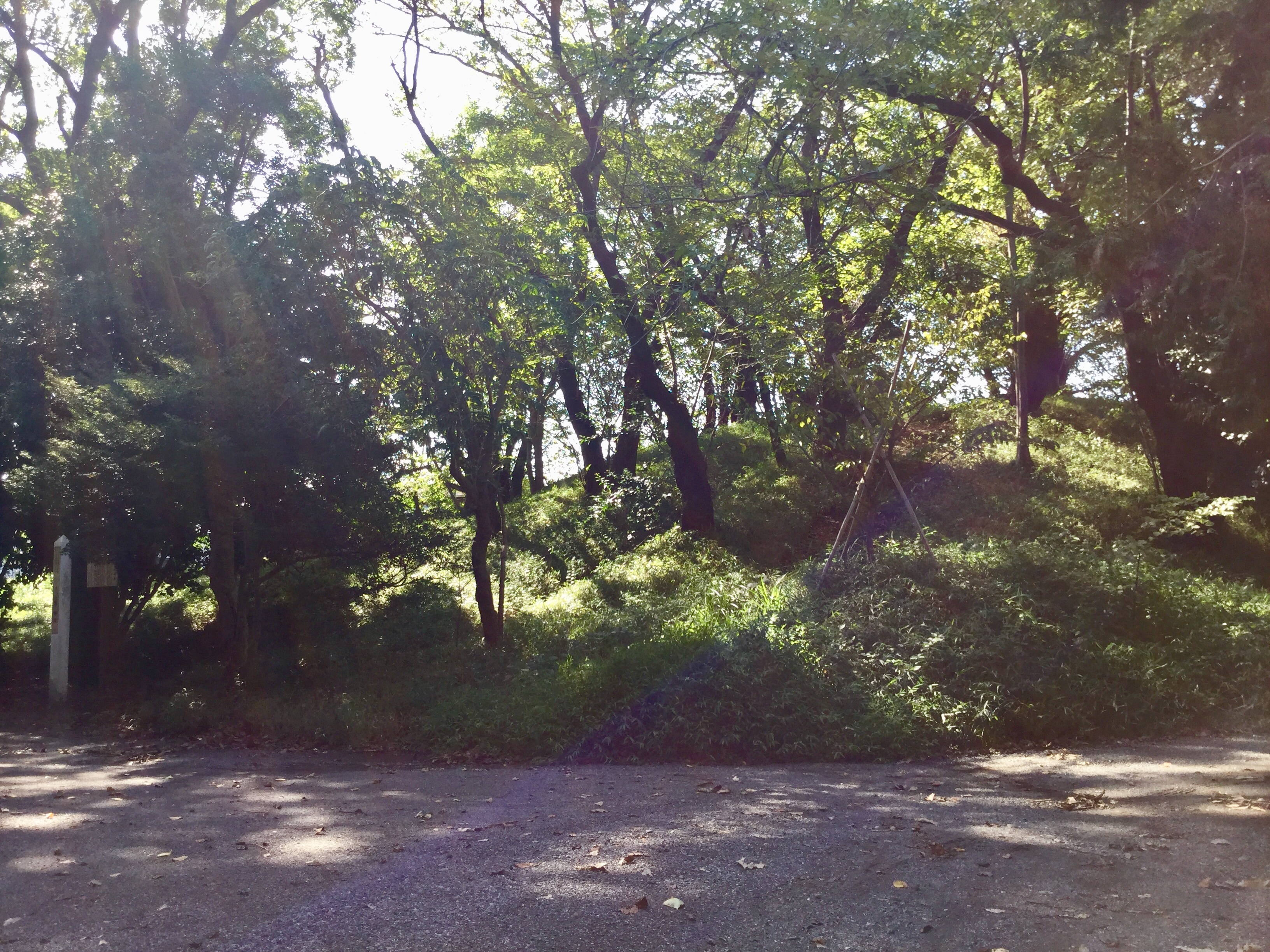 神奈川県にある大神塚古墳